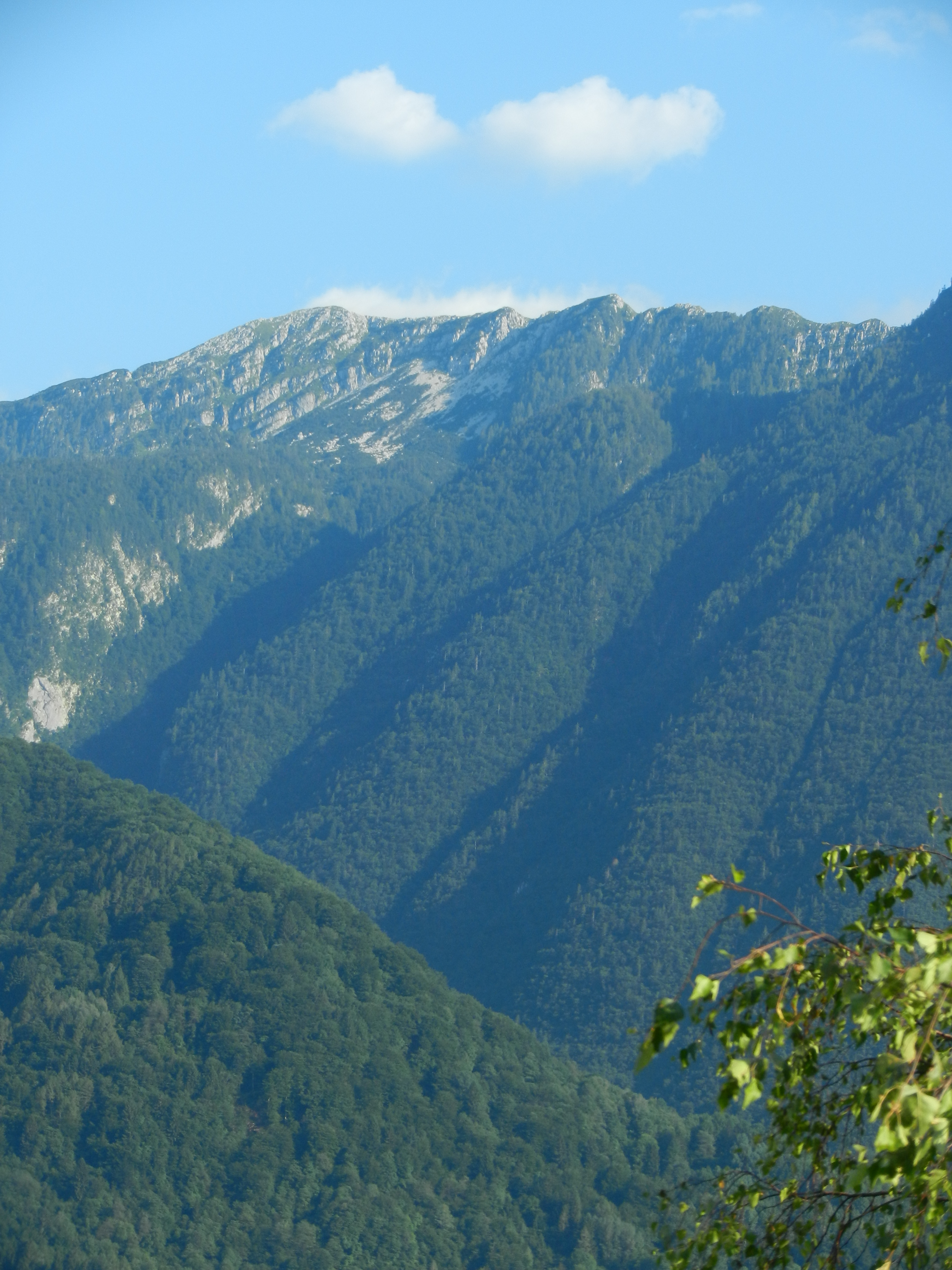 Krasji vrh in del grebena Polovnika iz Bovca